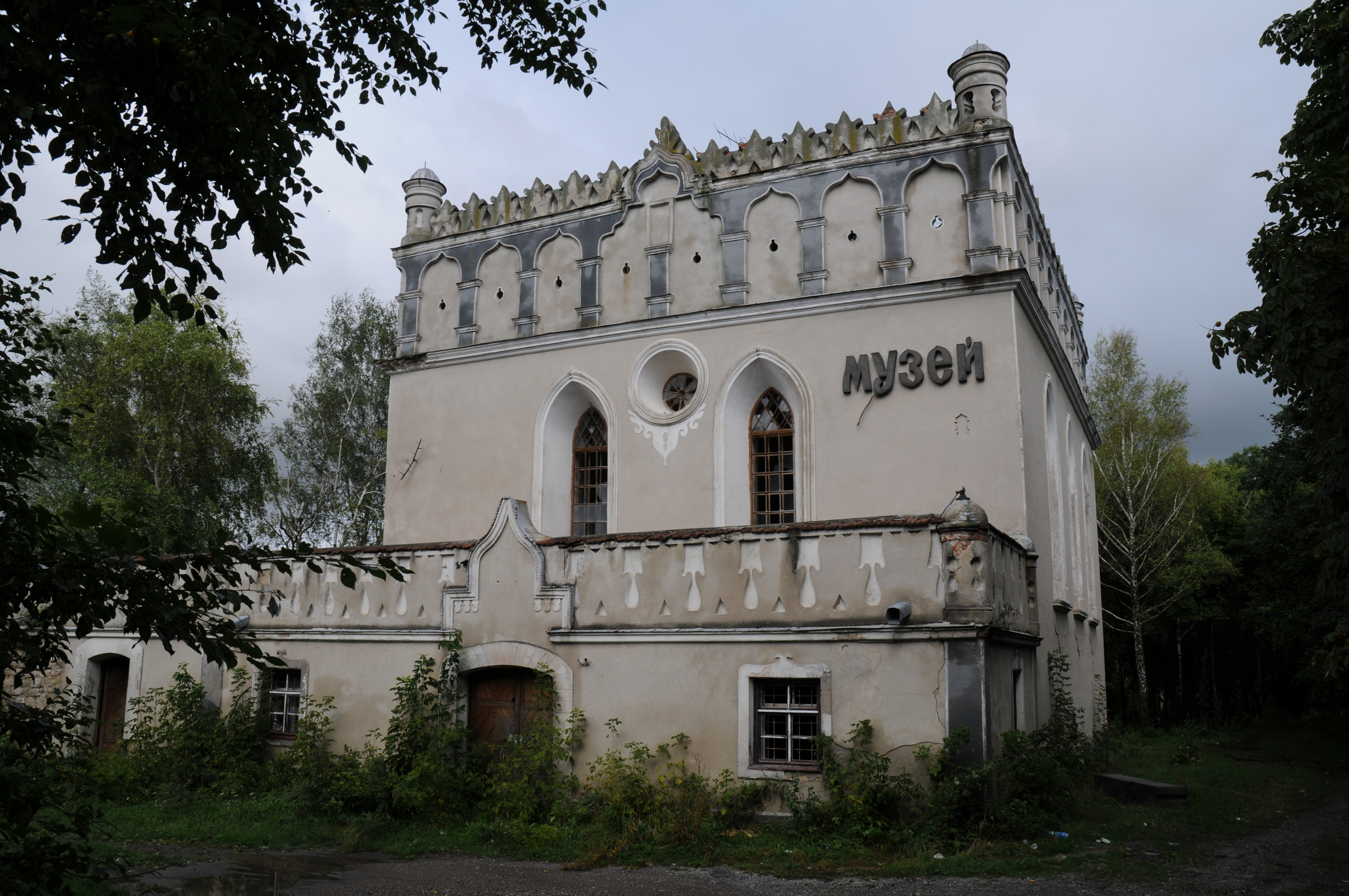 Гусятин, синагога